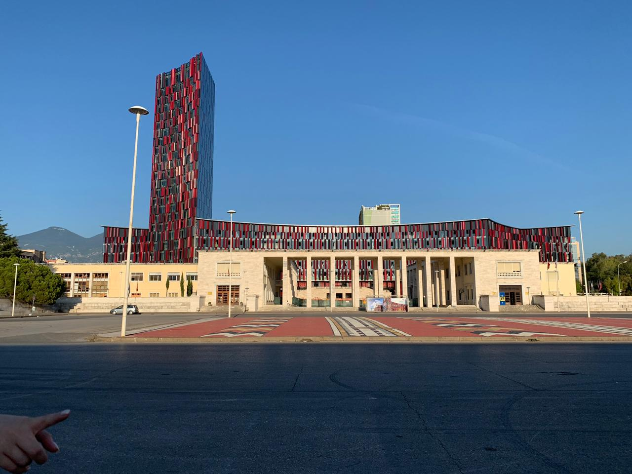 Muzeu Arkeologjik (Tiranë)